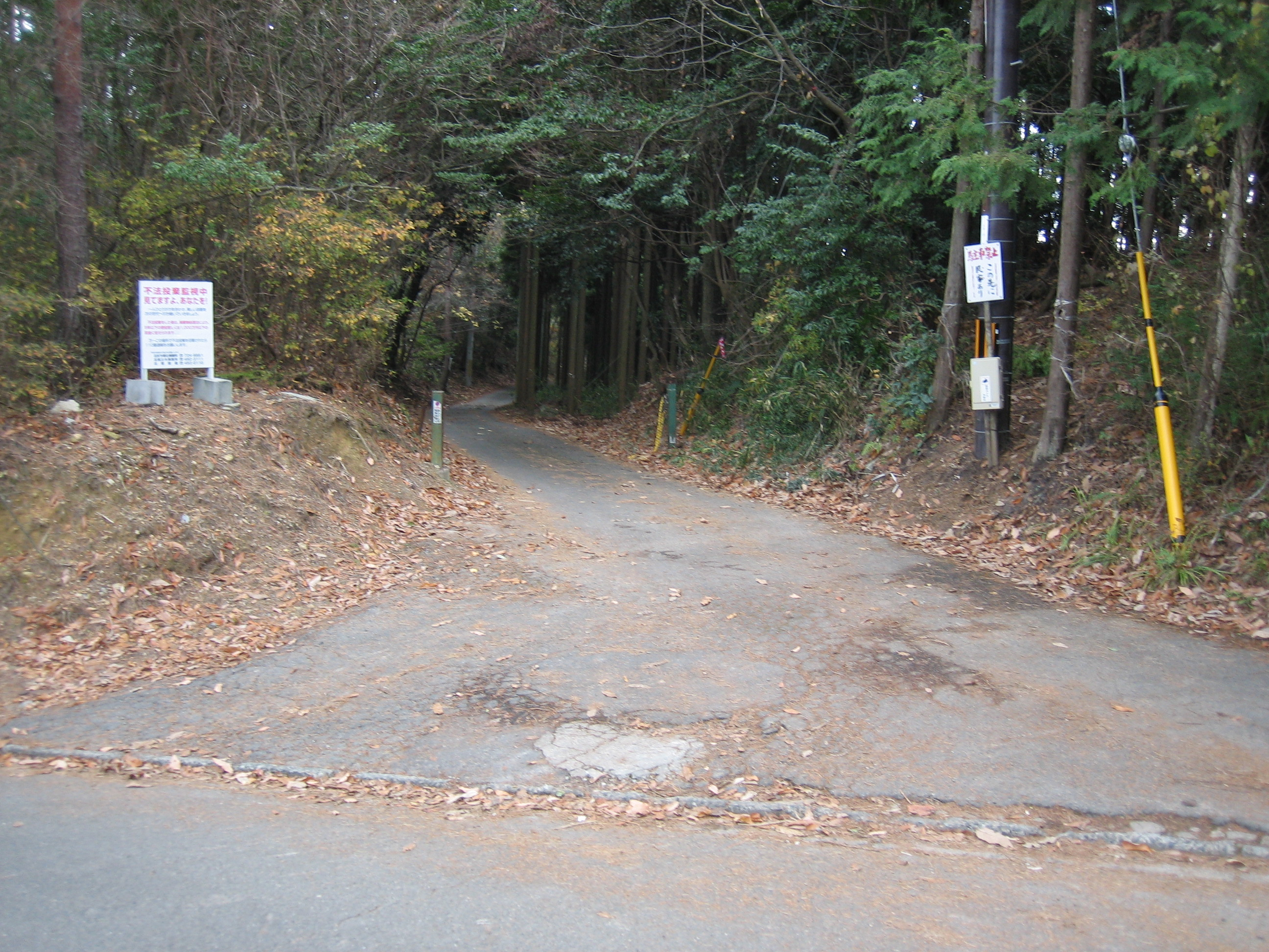 京見峠近くの道路を撮影